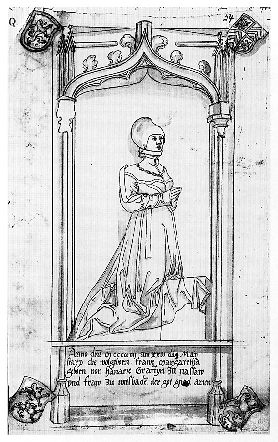 Tekening van het grafmonument voor Margarethe van Hanau-Lichtenberg